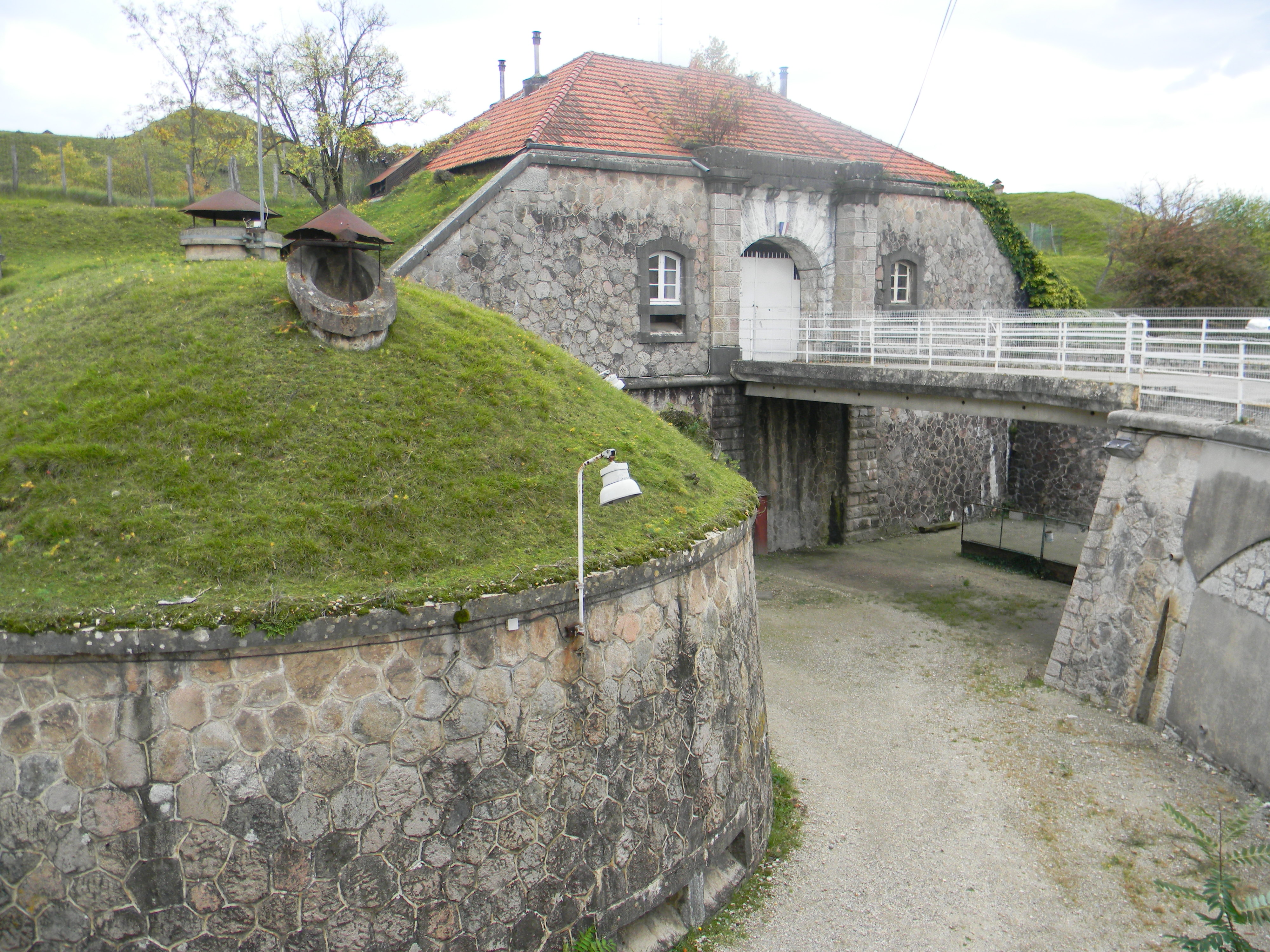 Vue sur le fossé, le pont et l'entrée arrière du Fort de Champvillard.